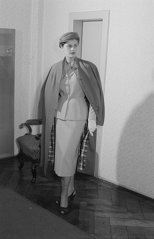 Original image description from the Deutsche Fotothek Eine Frau präsentiert Damenbekleidung